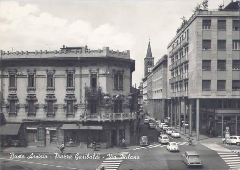 Casa Rena (oggi demolita) all'angolo tra piazza Garibaldi e via Milano a Busto Arsizio. Opera di Silvio Gambini.